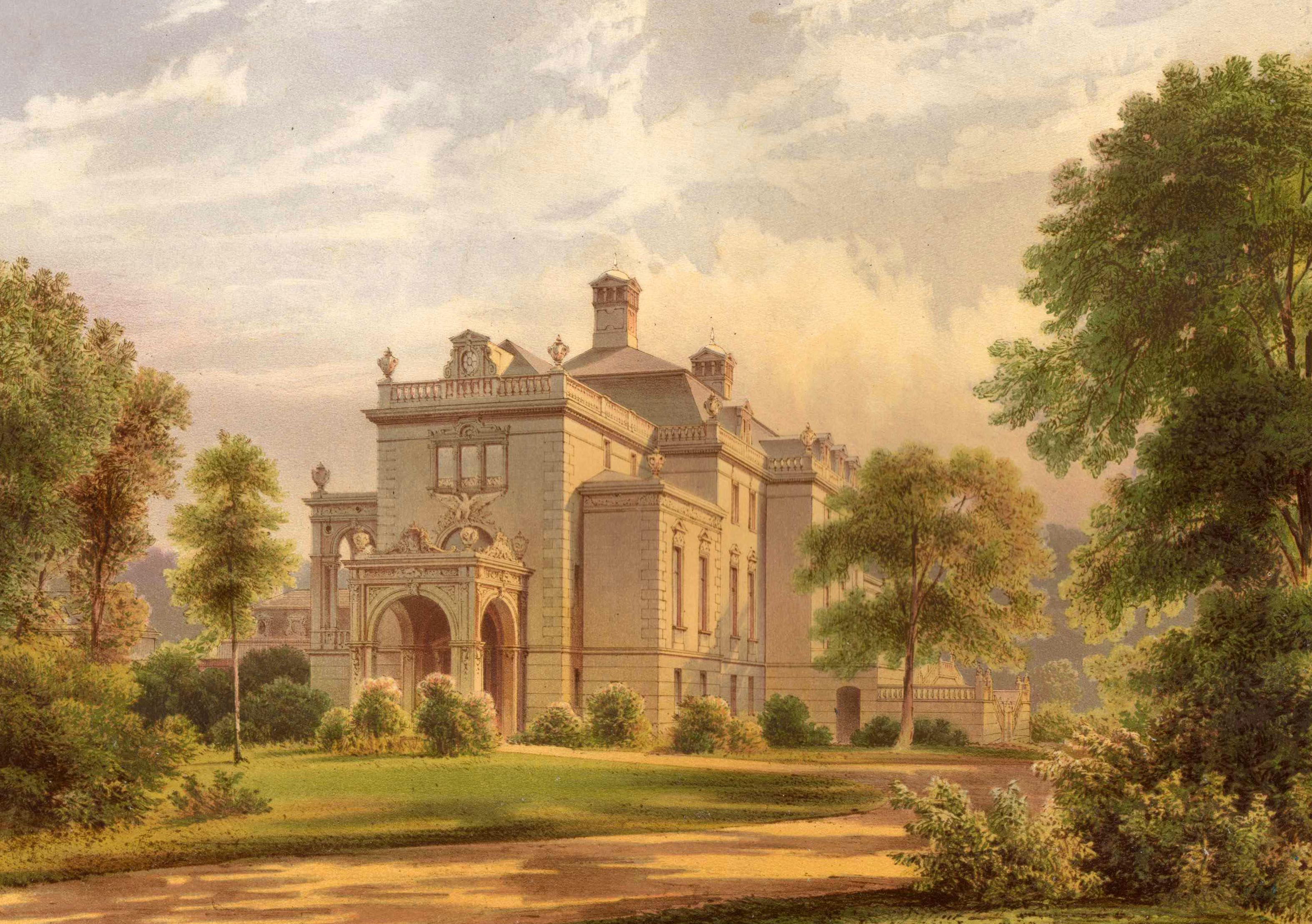 Die Vorfahrt des Jagdschloss Glienicke von Ferdinand von Arnim, nach 1862